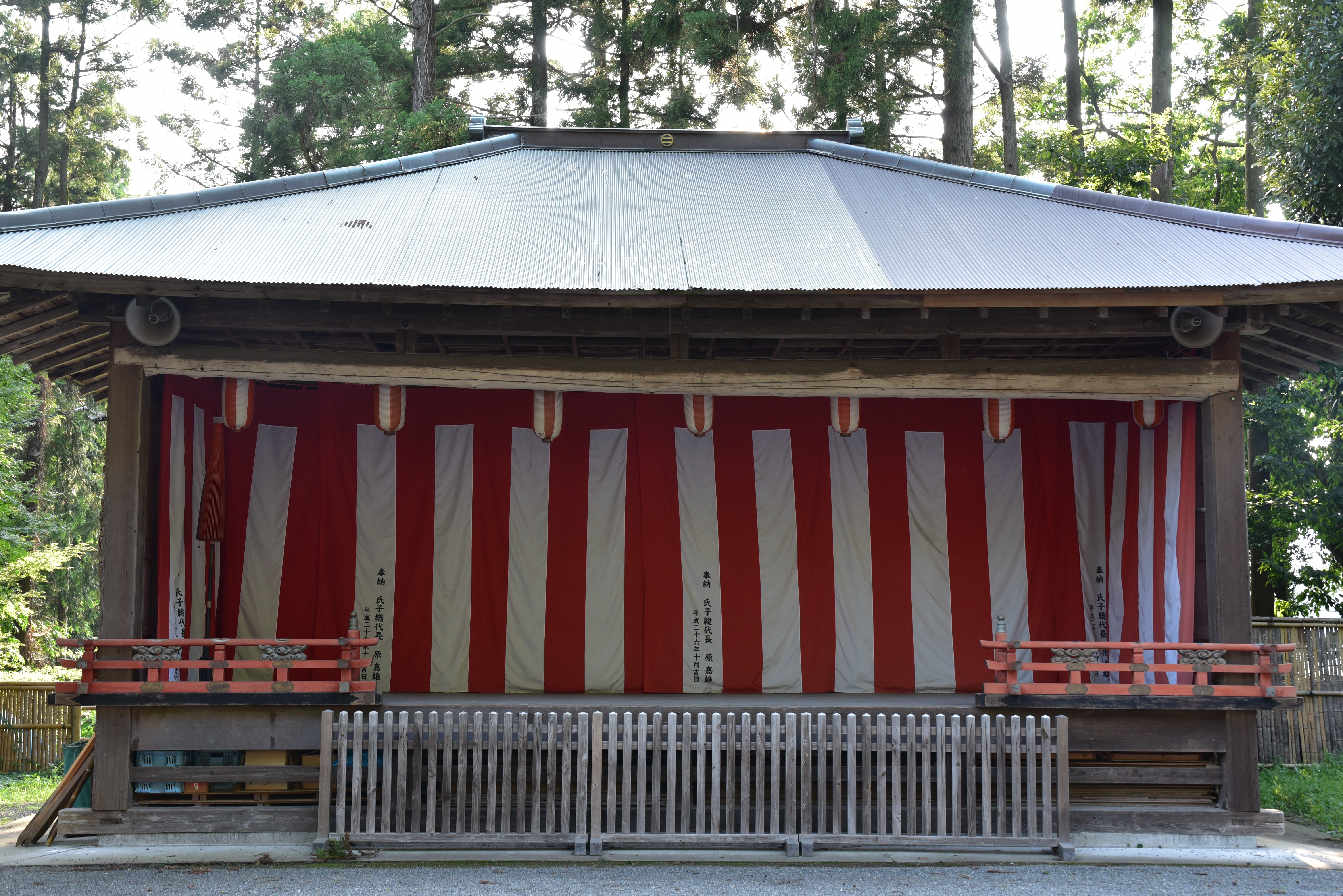 川勾神社の神楽殿（二宮町）